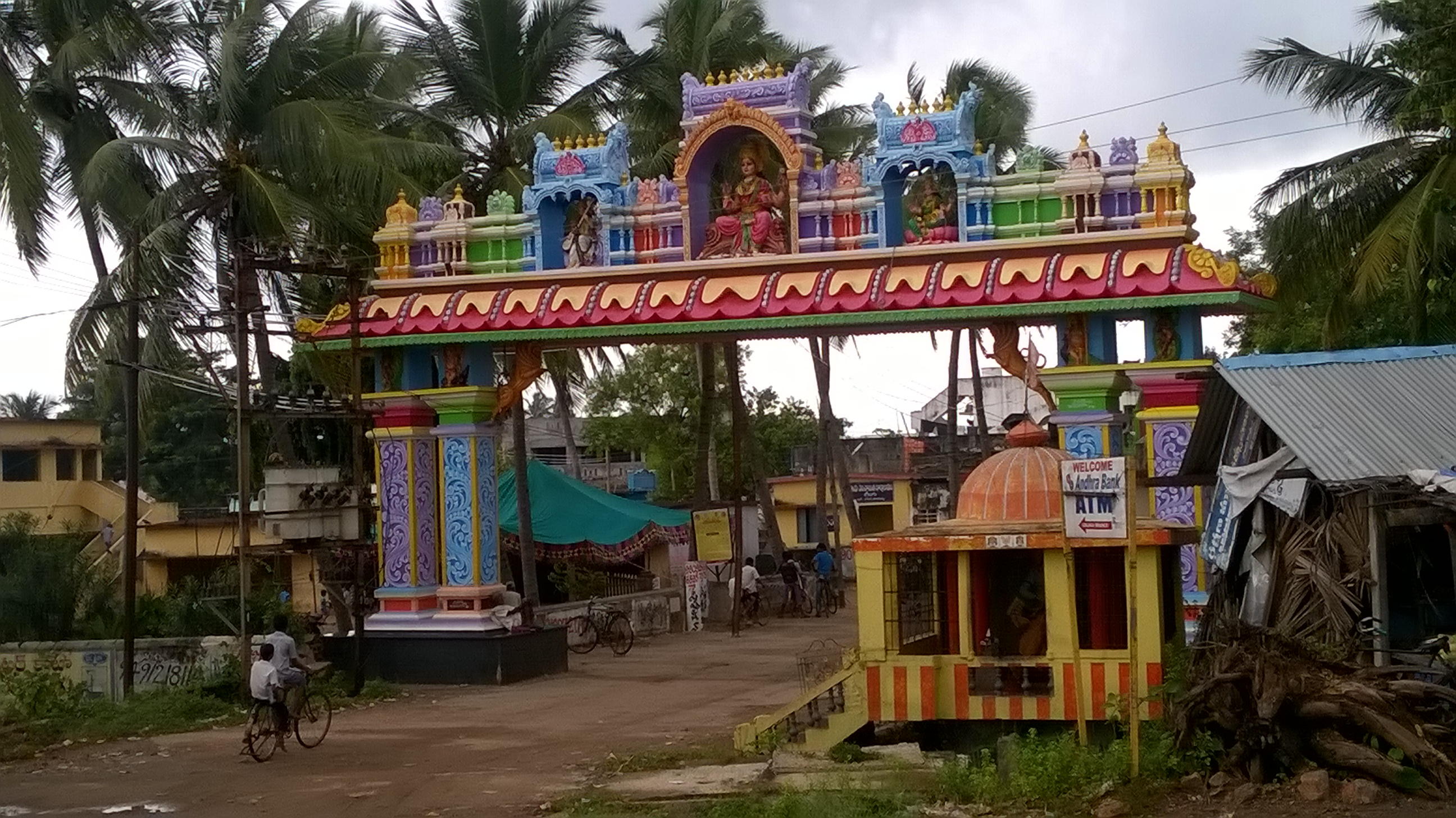 Lolugu village entrance gate